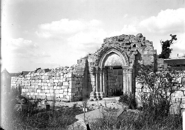 L'ancienne église Saint-Médard d'Aizy détruite pendant la guerre de 1914-1918, reconstruite après-guerre. Seul subsistait le portail de l'ancienne église. (commune d'Aizy-Jouy, Aisne, Hauts-de-France).